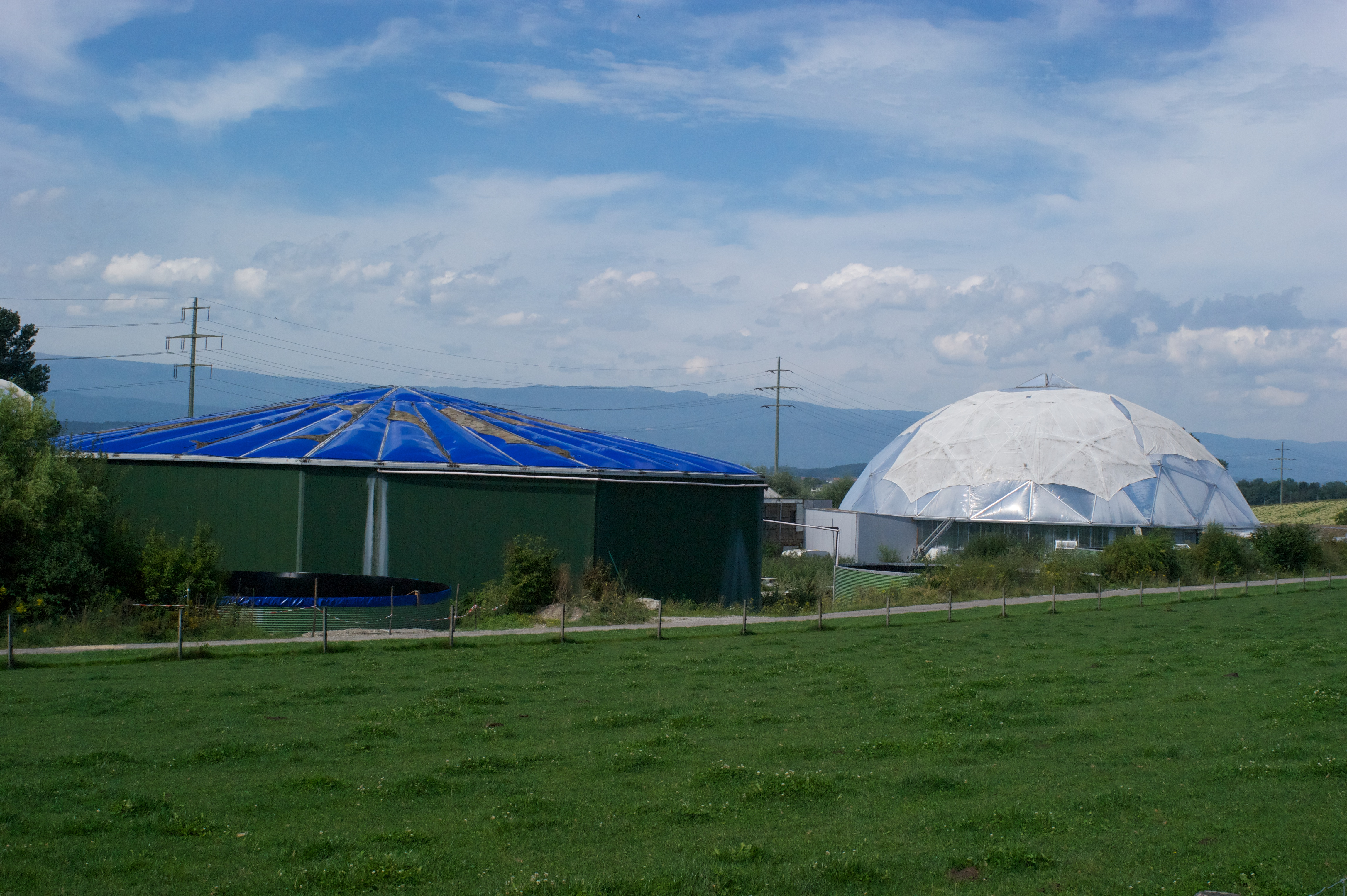 Vue du Nocturama et de la serre tropicale